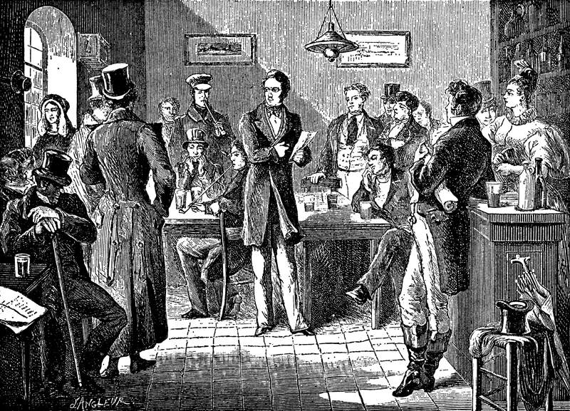 Jenneval verliest die Brabançonne